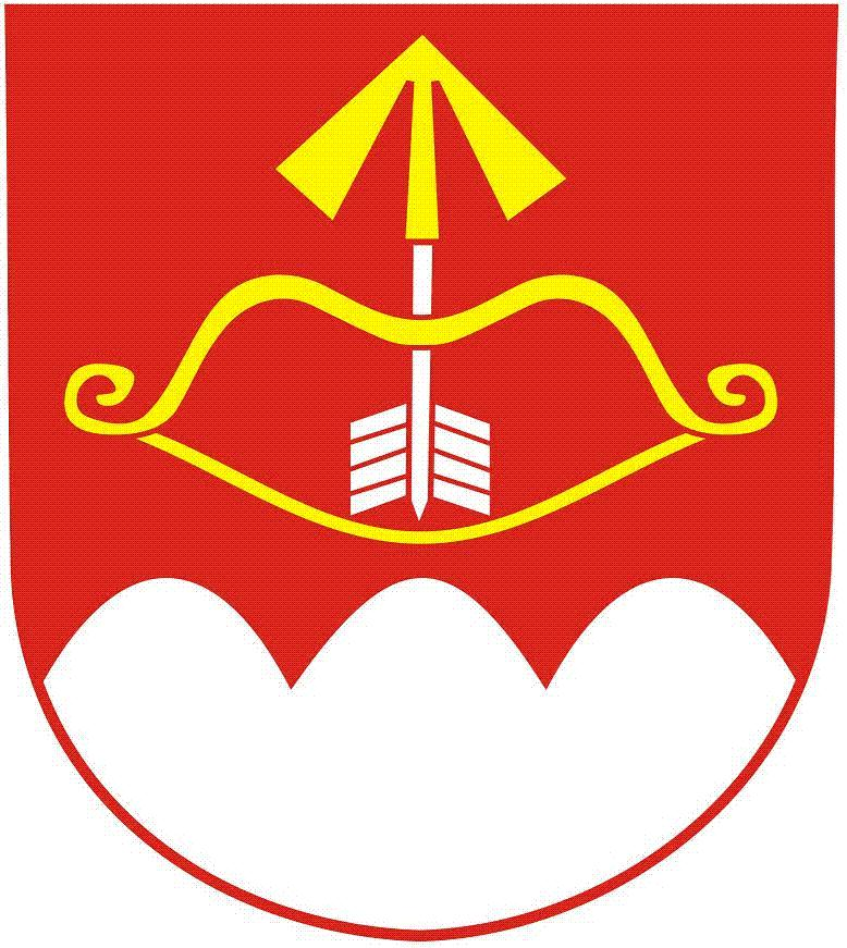 Znak obce Stříbrné Hory (okres Havlíčkův Brod)